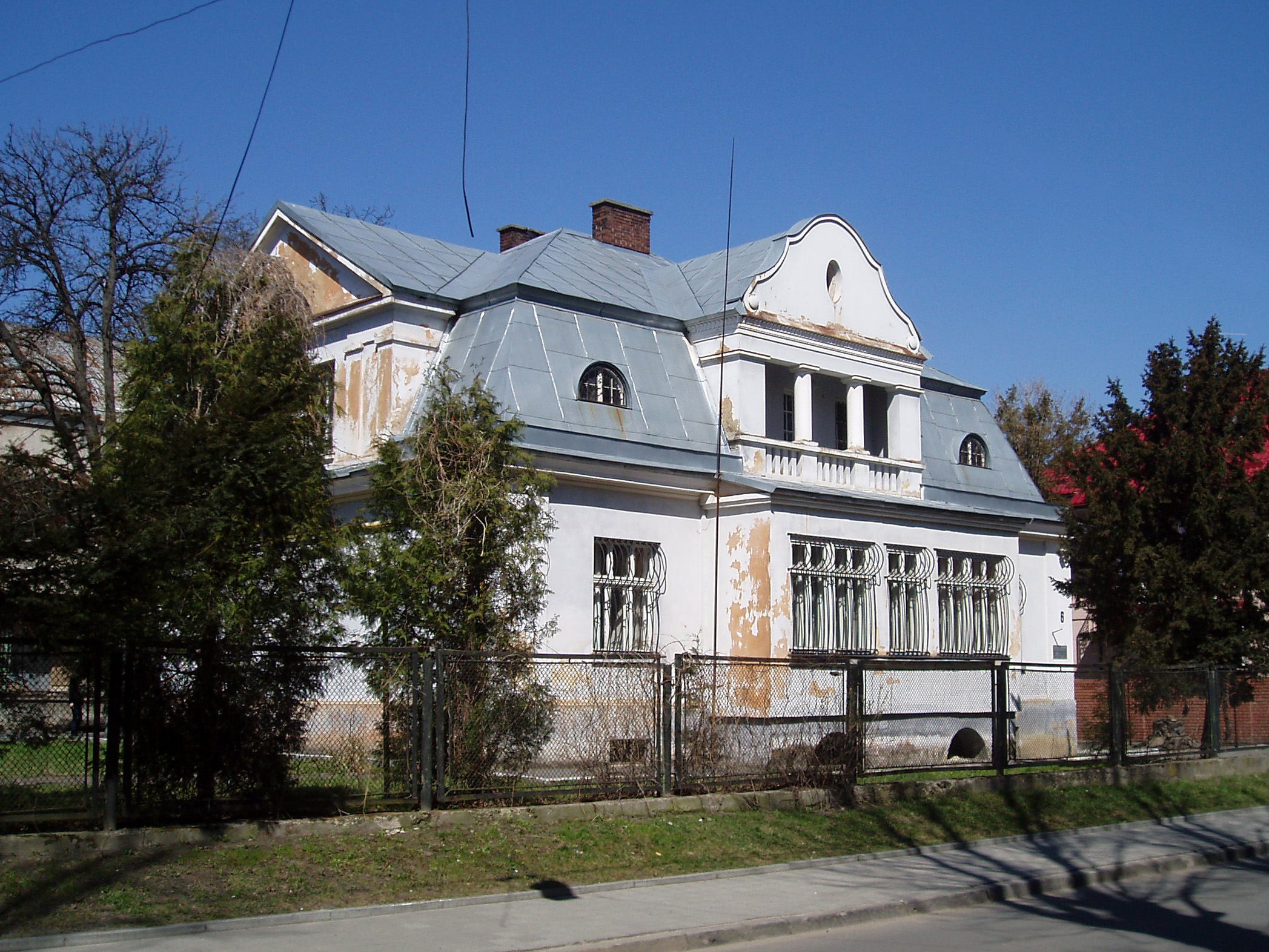 Власна вілла архітектора Чеслава Мюллера на вулиці Квітневій, 6 у Львові. Збудована за його проектом 1925 року.